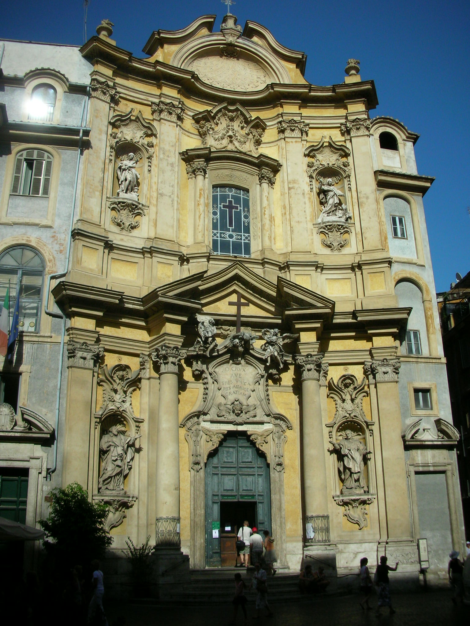 Façade, Santa Maria Maddalena, Rome